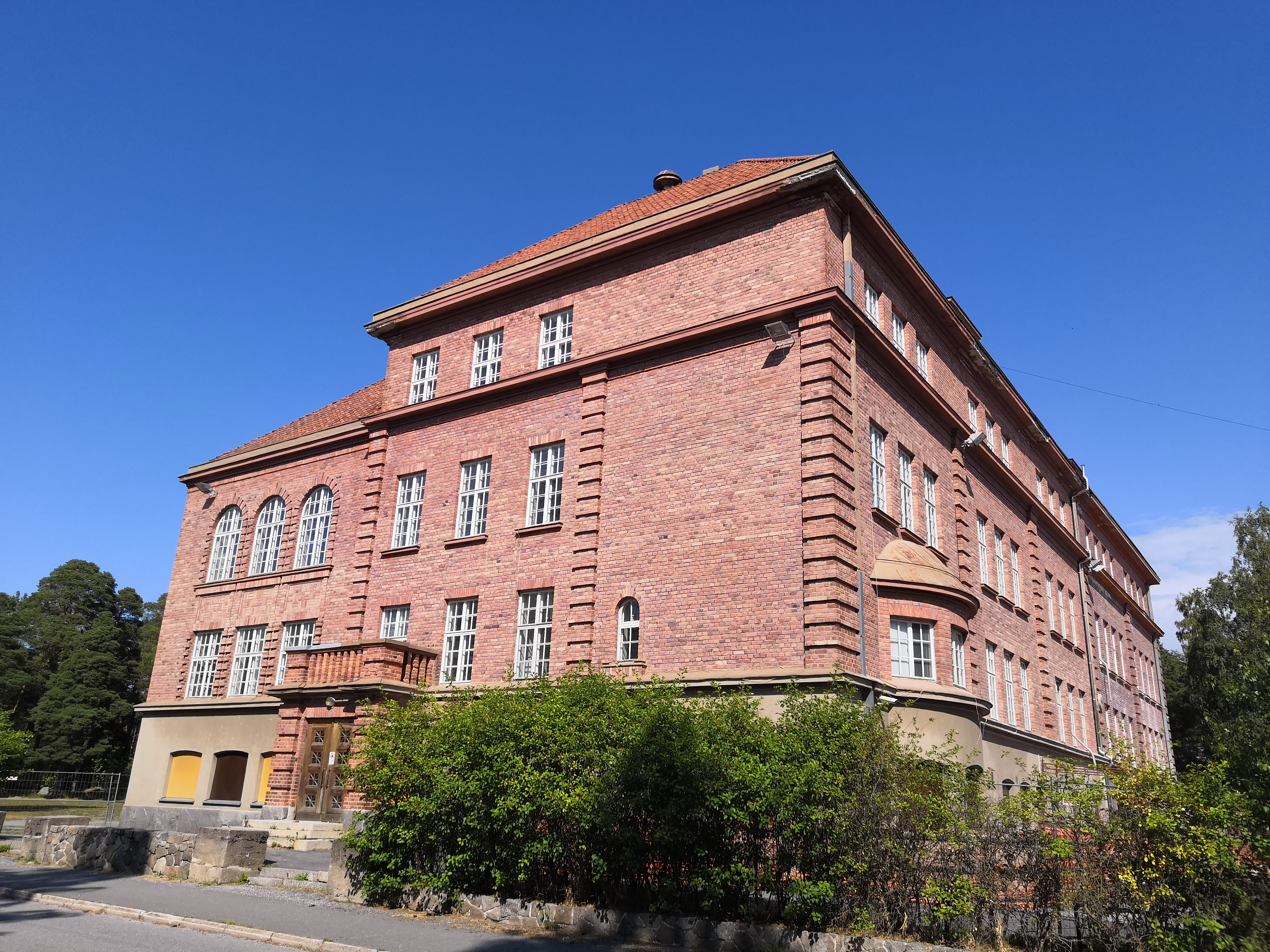 Ollut käytössä ala-asteena. Nykyään ei ole missään käytössä.